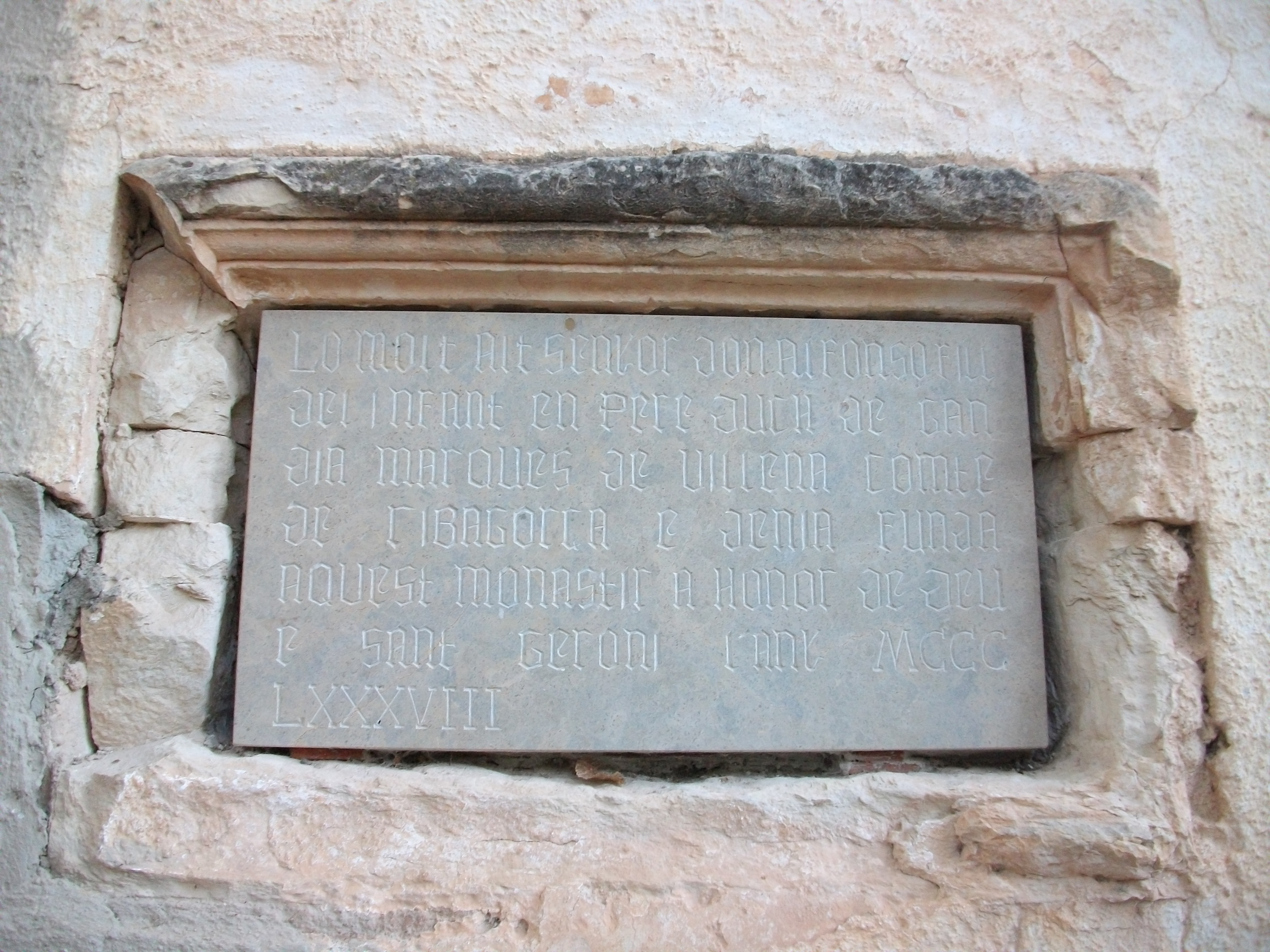 Rèplica de la làpida fundacional del monestir.